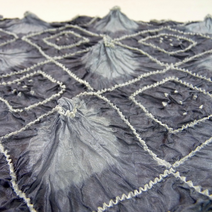 Seidenrelief in Bandhani-Technik